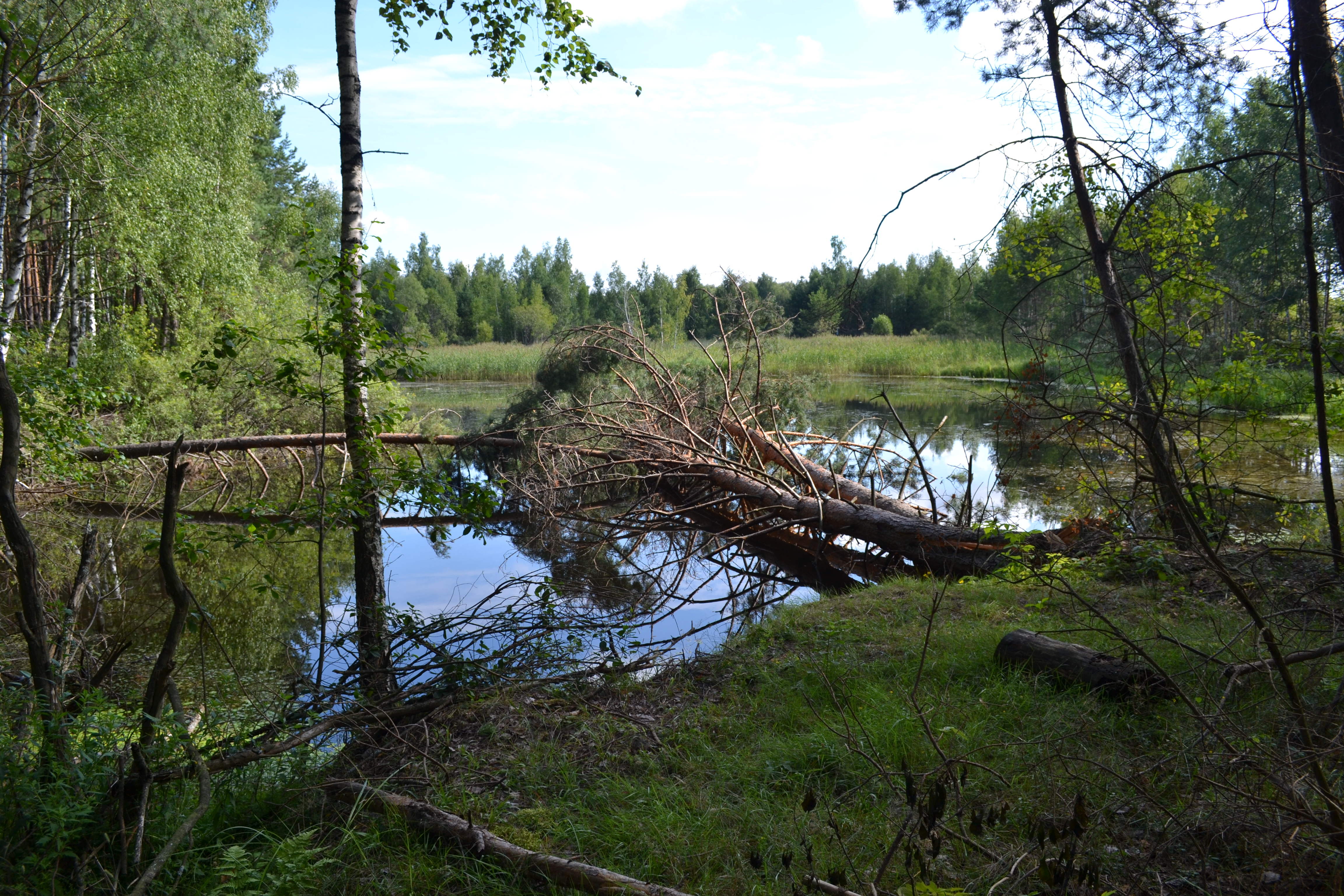 Пруд у деревни Семёновской (Шатурский район)